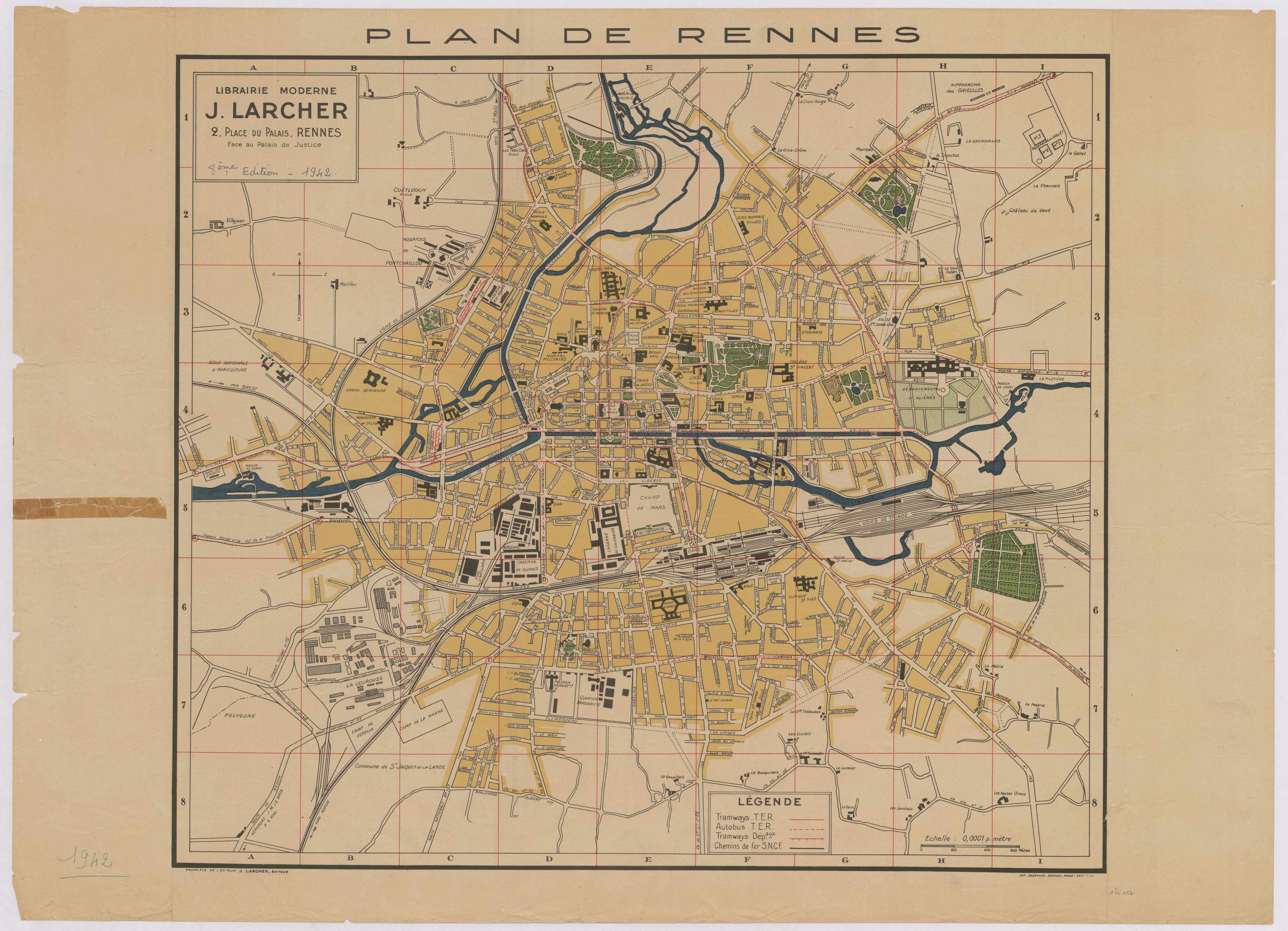 Plan de la ville de Rennes, avec tracés des tramways TER, autobus TER, tramways départementaux et chemin de fer SNCF. Edition J. Larcher Librairie moderne, 8e édition. Archives municipales de Rennes 1 Fi 117.